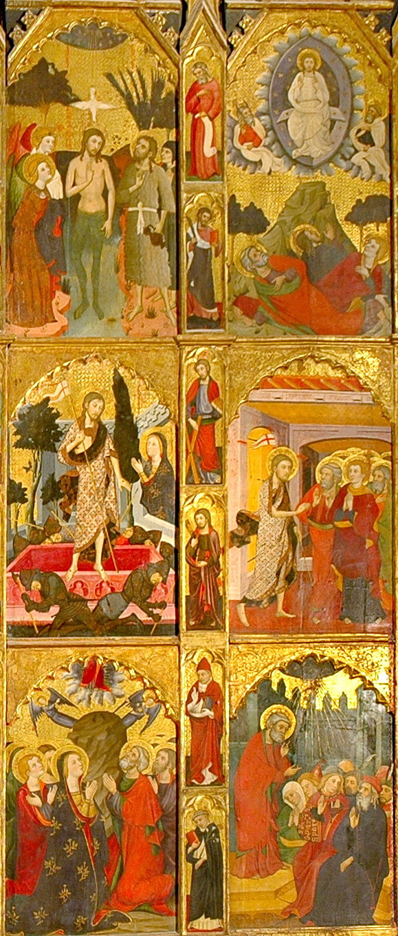 Retaule del Sant Esperit de la Seu de Manresa. Carrers del costat dret.